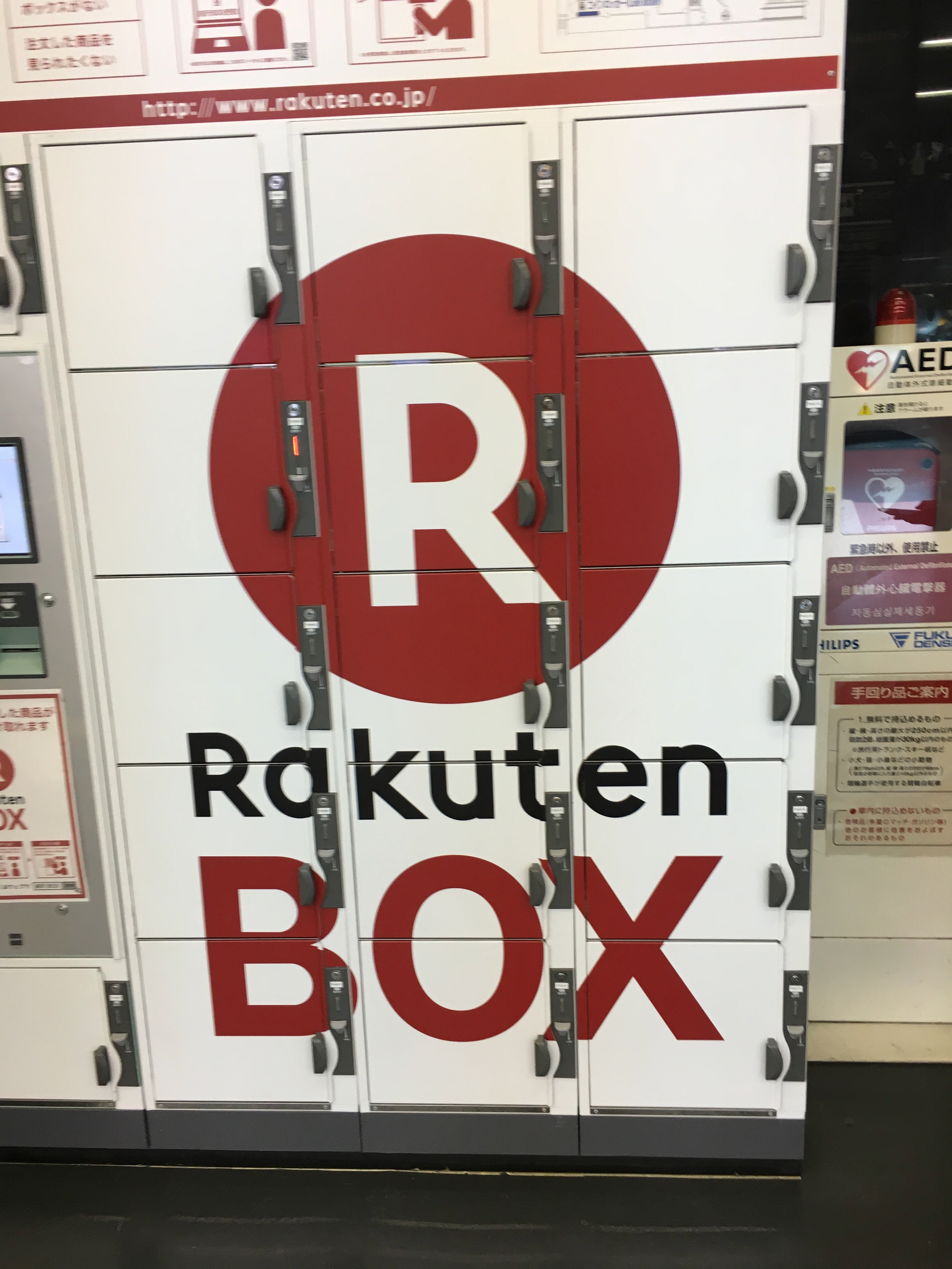 楽天受け取りボックス